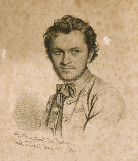 Jankó János (1833–1896) festő, grafikus. Marastoni József litográfiája (1861)